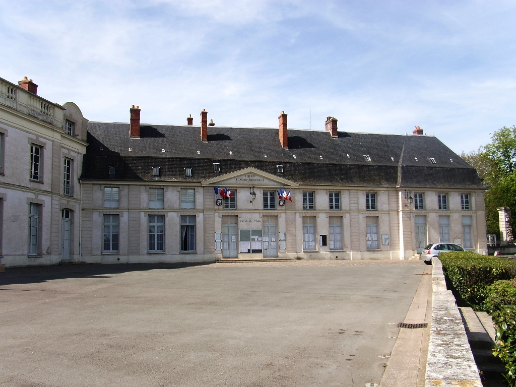 Façade de l'Hôtel-de-Ville de Dourdan (91)